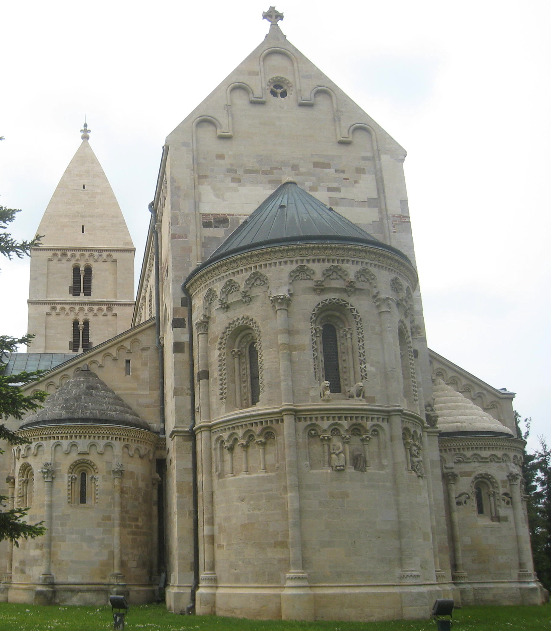 Cerkev sv. Jurija, Ják, Madžarska; pogled na vzhodno stran cerkve.